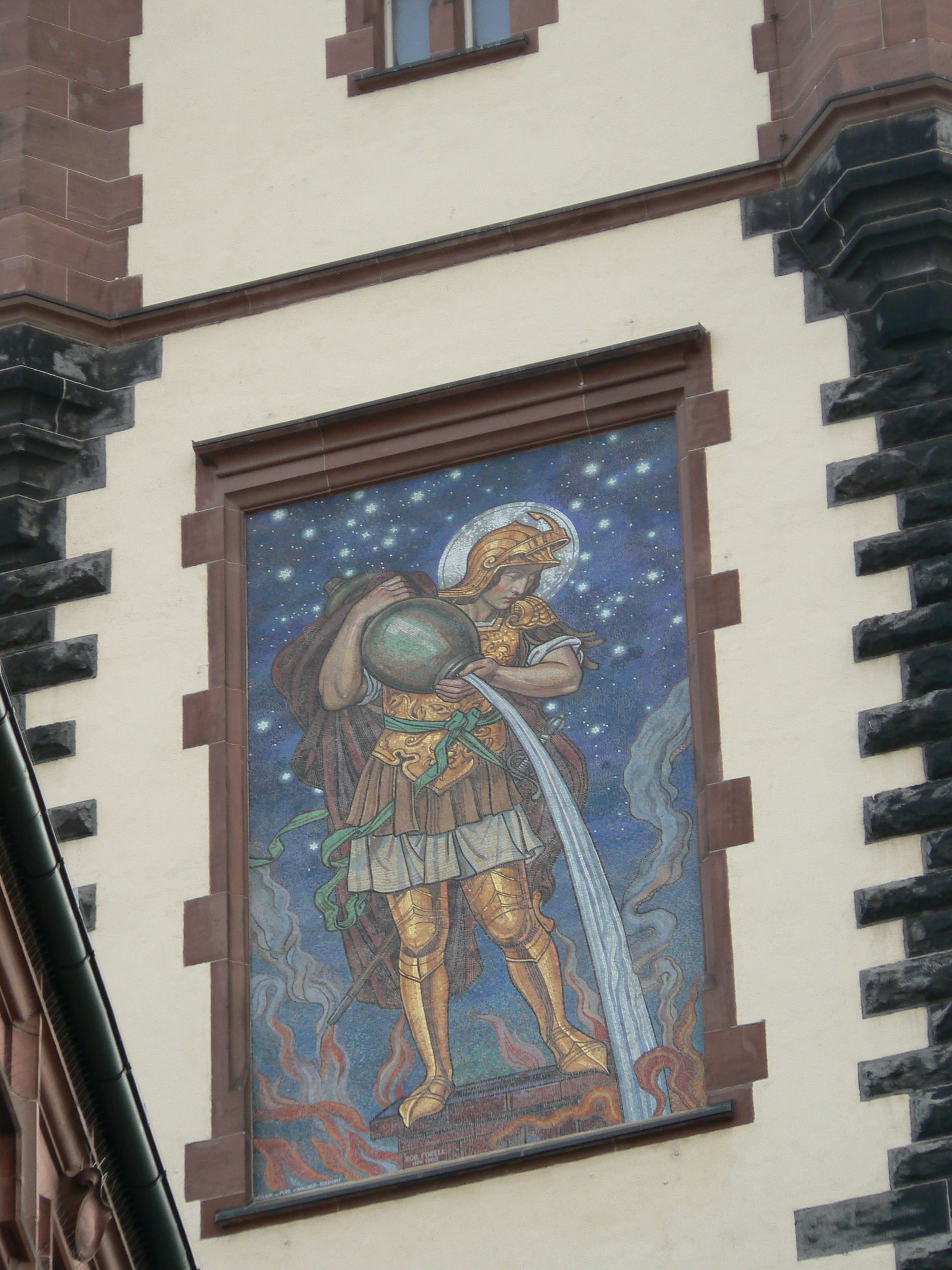 Glasmosaik "Der heilige Florian" auf dem Rathausturm "Langer Franz" in Frankfurt am Main, Entwurf von Robert Forell, 1902